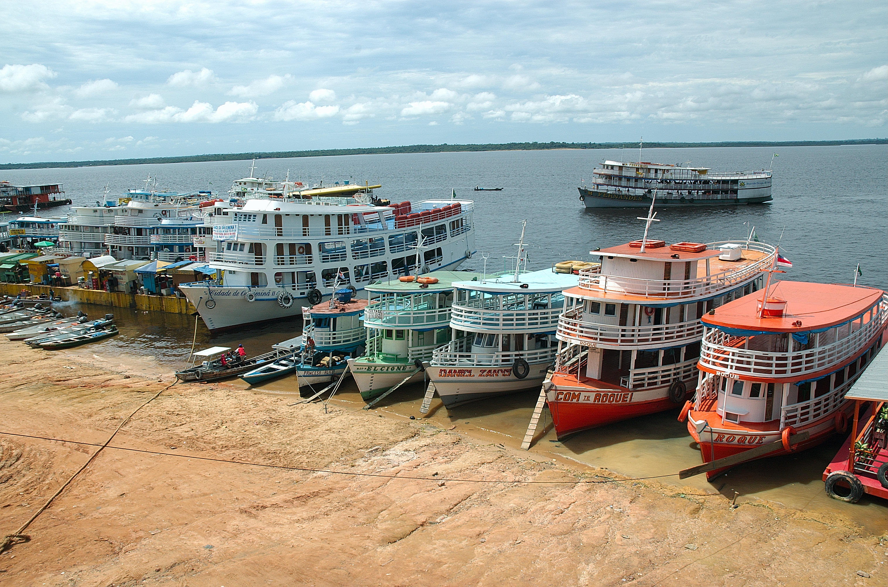 Hafen von Manaus